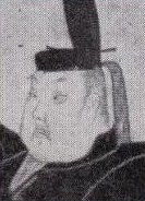 天子摂関御影より、藤原家忠像。